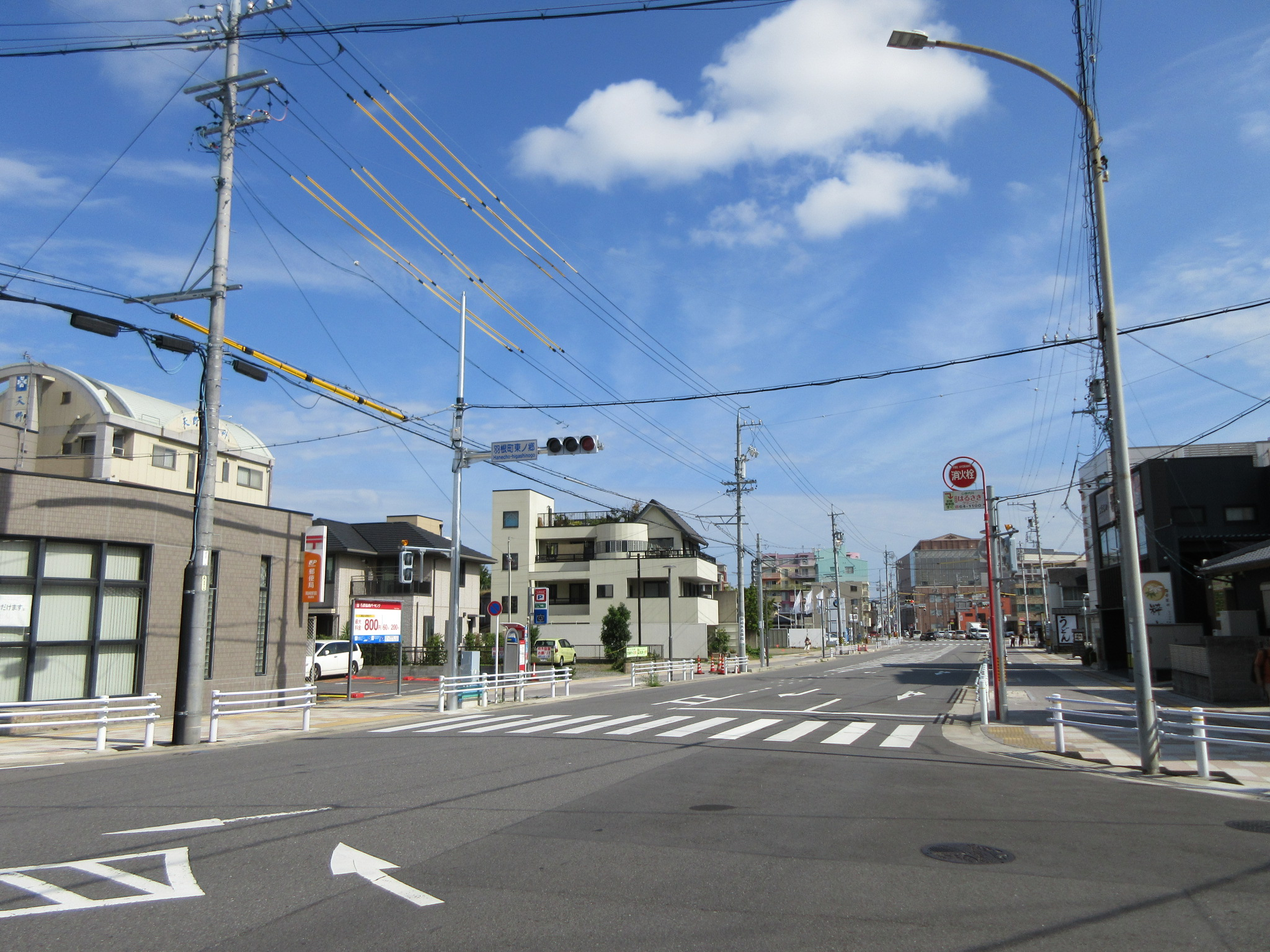 愛知県道478号岡崎停車場線。羽根町東ノ郷交差点にて。